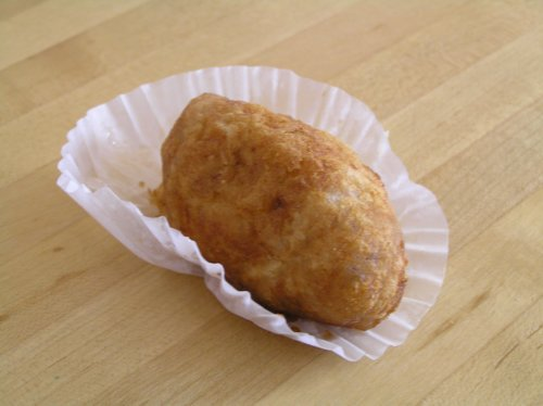 Taro Dumpling